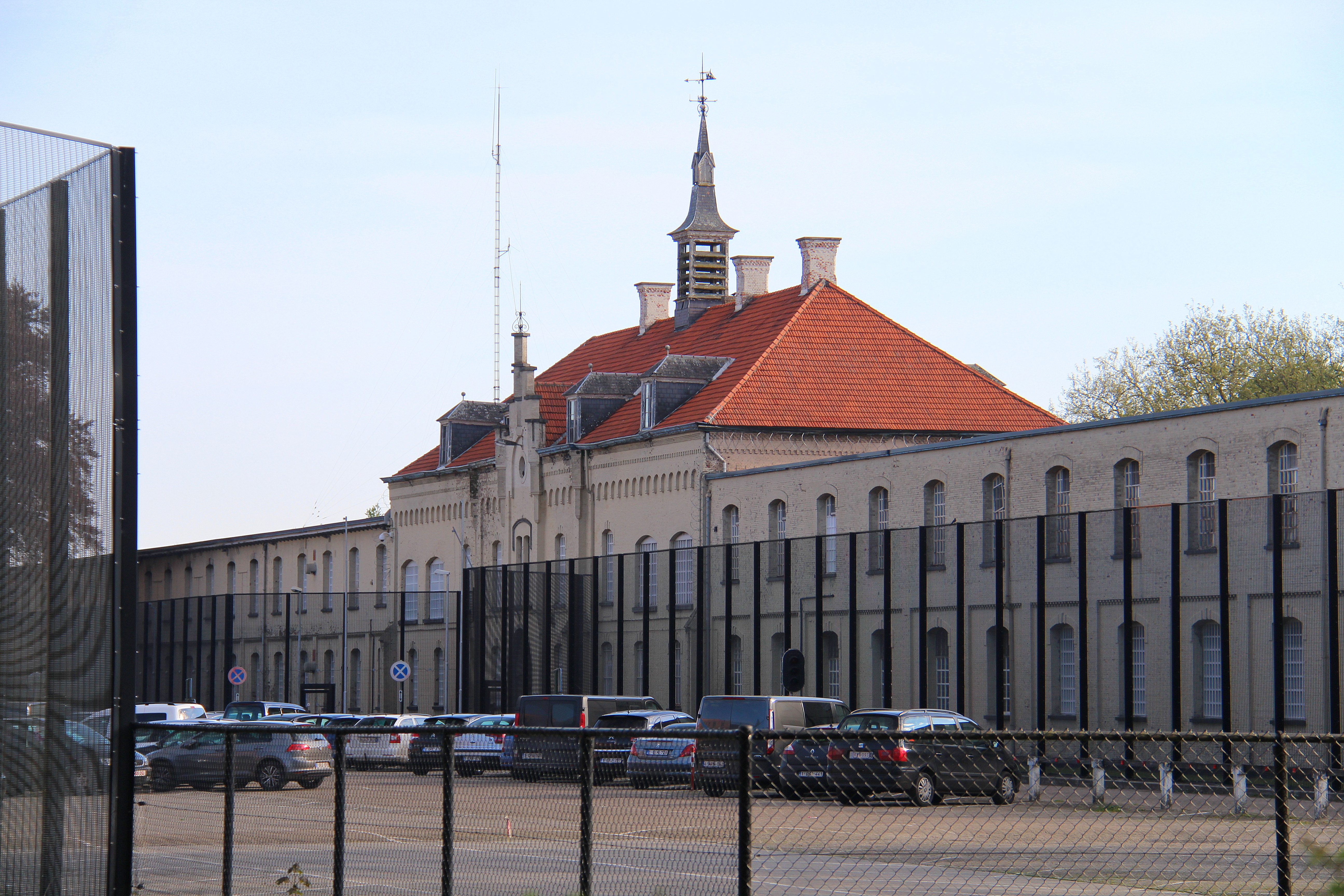 De strafinrichting van Merksplas werd in 1825 gebouwd als kolonie om bedelaars en landlopers op te vangen. Na WO II evolueerde zij naar een halfopen gevangenis met gemeenschapsregime. Vandaag is zij een gesloten inrichting voor veroordeelden.